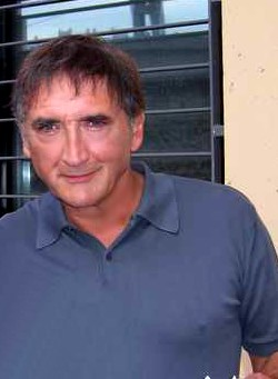 Le comédien français Louis-Alexandre Fabre (dit Alexandre Fabre) en juillet 2006.